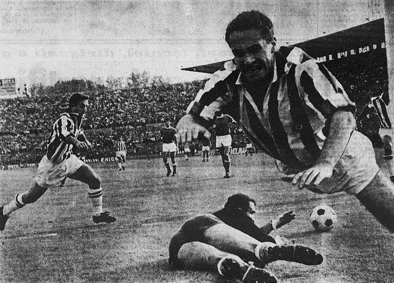 Torino, stadio Comunale, 19 settembre 1965. L'attaccante juventino Silvino Bercellino (in primo piano) non riesce a correggere in rete la palla a causa dell'intervento del portiere napoletano Claudio Bandoni (in secondo piano), nel corso della sfida tra Juventus F.C. e S.S.C. Napoli (0-0) valevole per la 3ª giornata del campionato italiano di Serie A 1965-66; neanche l'altra punta juventina, l'accorrente Giampaolo Menichelli (sullo sfondo), riuscirà nell'occasione a mettere il pallone in porta.